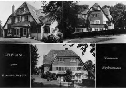 Ooievaarsnest Wassenaar